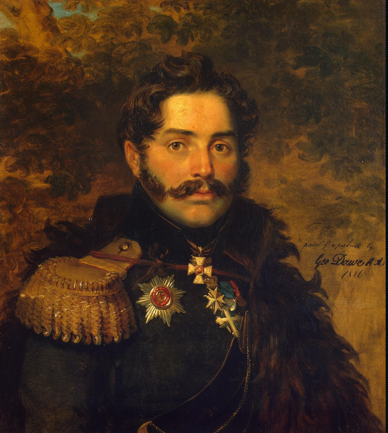 Alexandr Fyodorovich Scherbatov (13.07.1773 – 30.04.1817) russian general